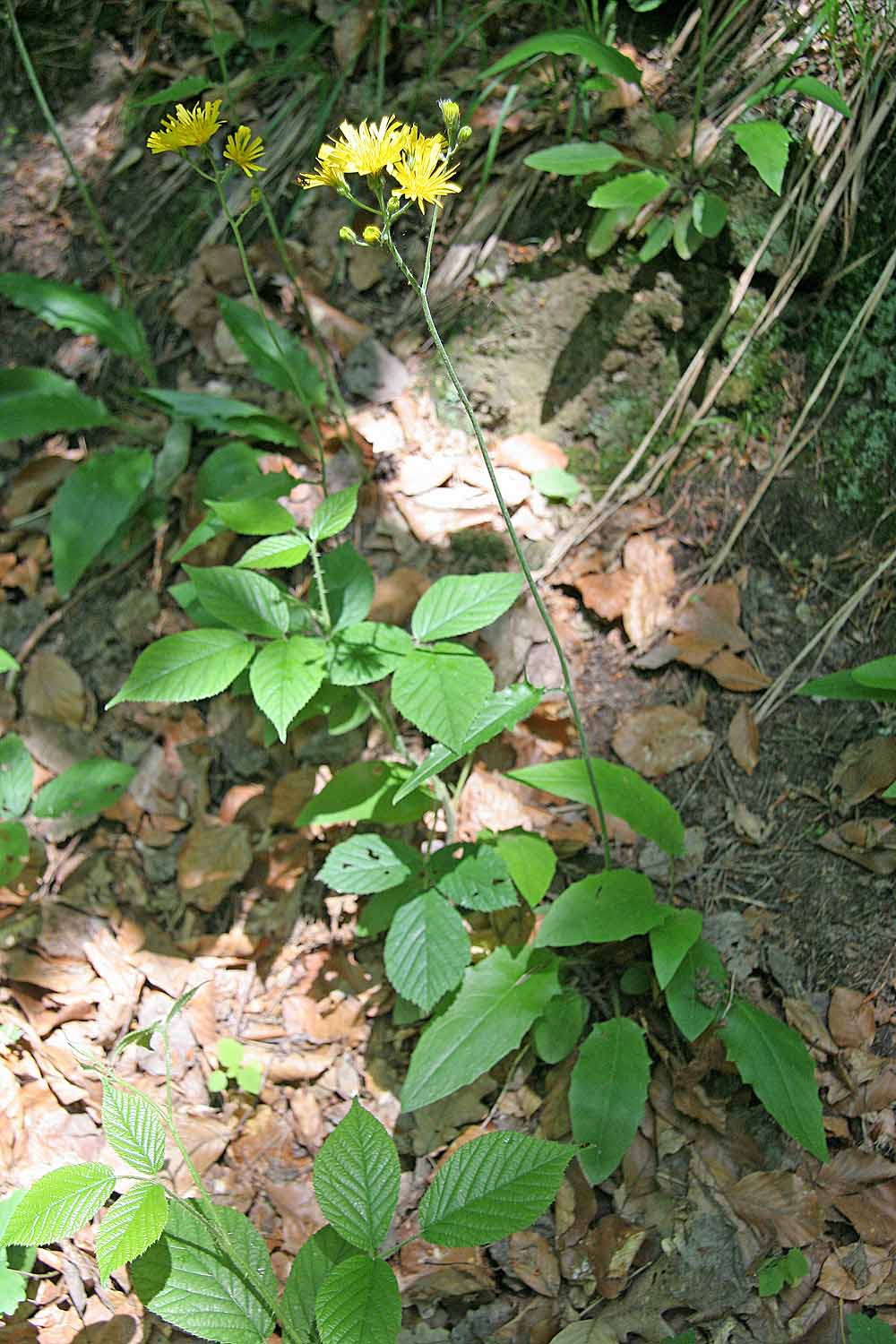 Hieracium murorum autor:Prazak